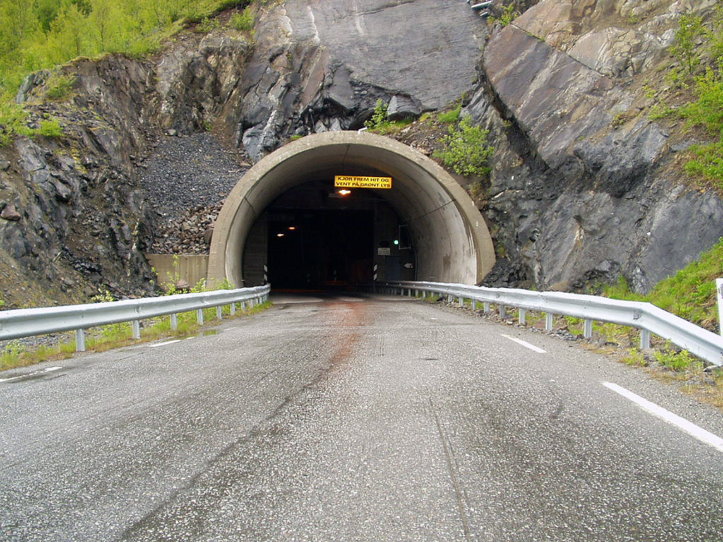 Åpningen på østsiden av Øksfjordtunnelen